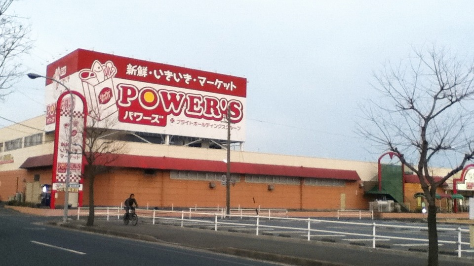 POWER'Sの写真です。